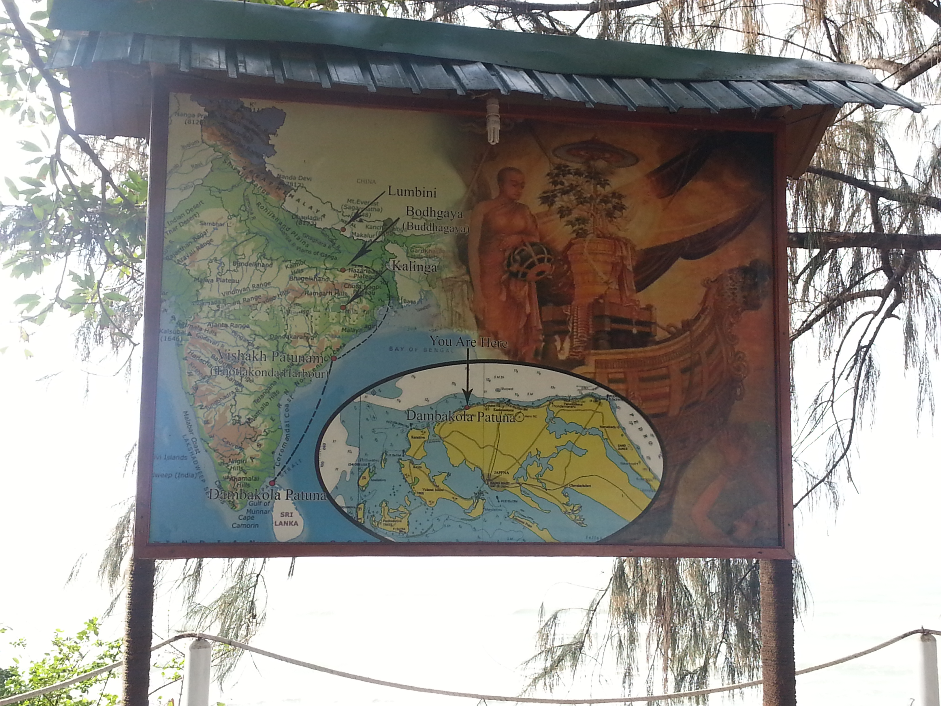 ஆதார சான்றுகள்